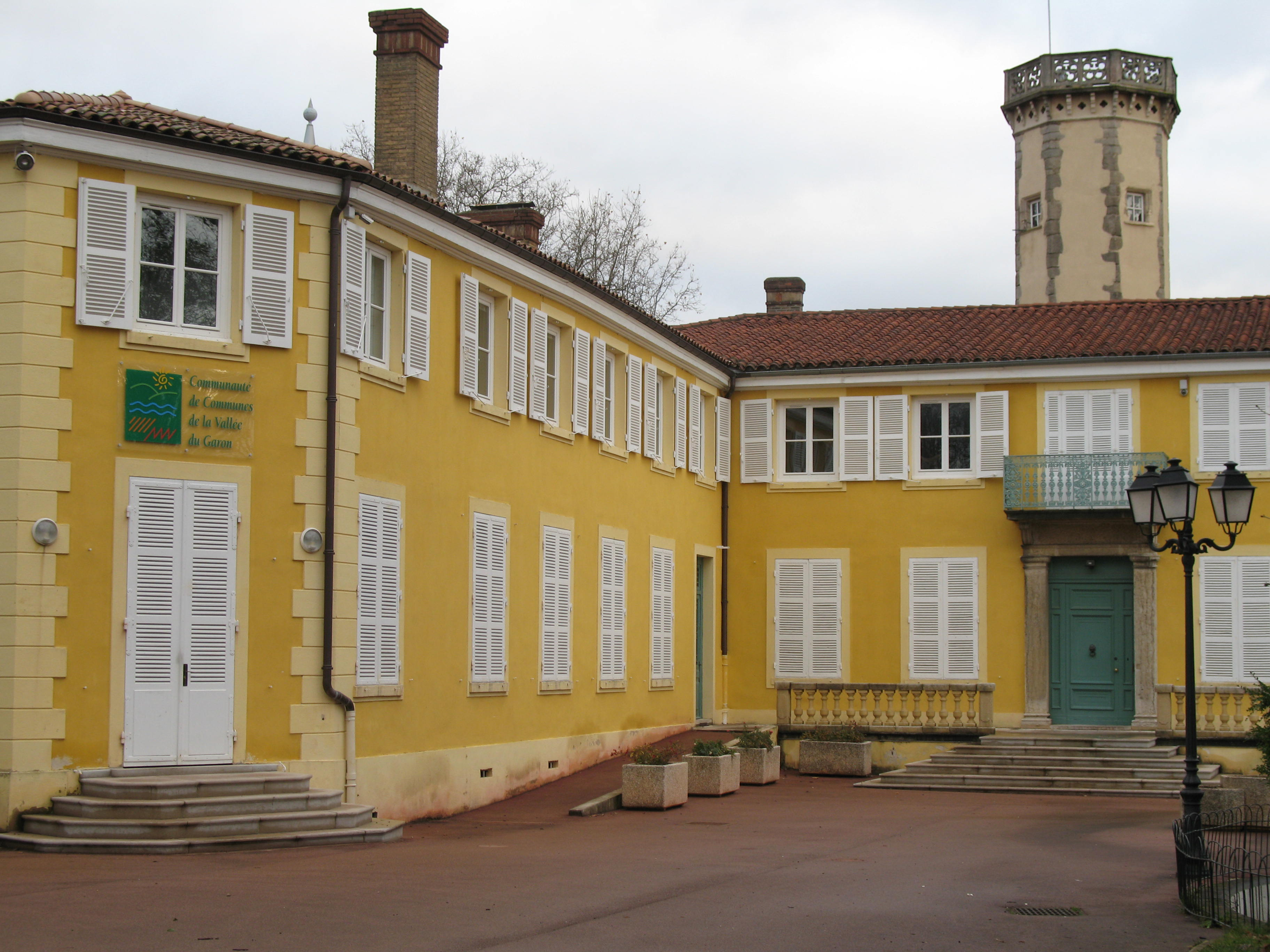 Maison Forte de Vourles dans le Rhône